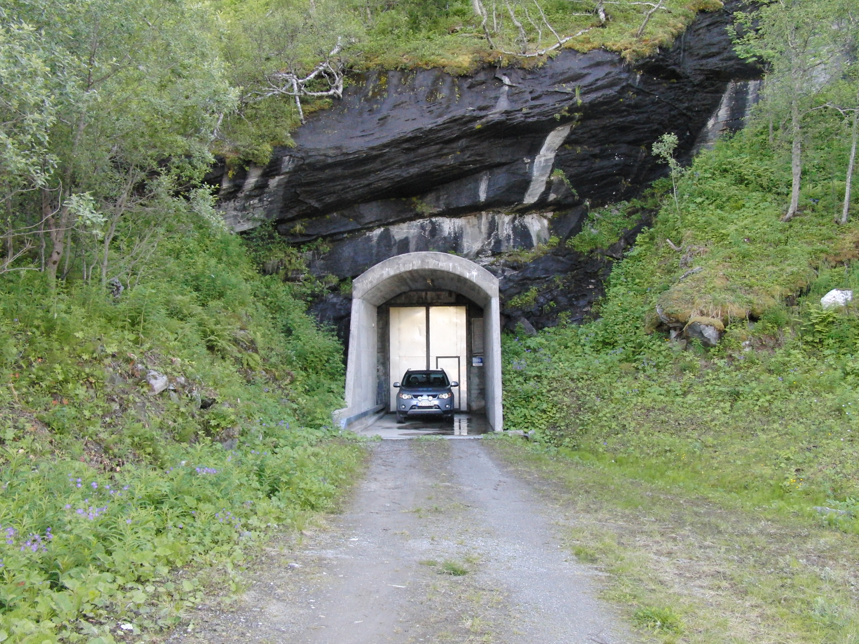 Langvatn kraftverk Gildeskål